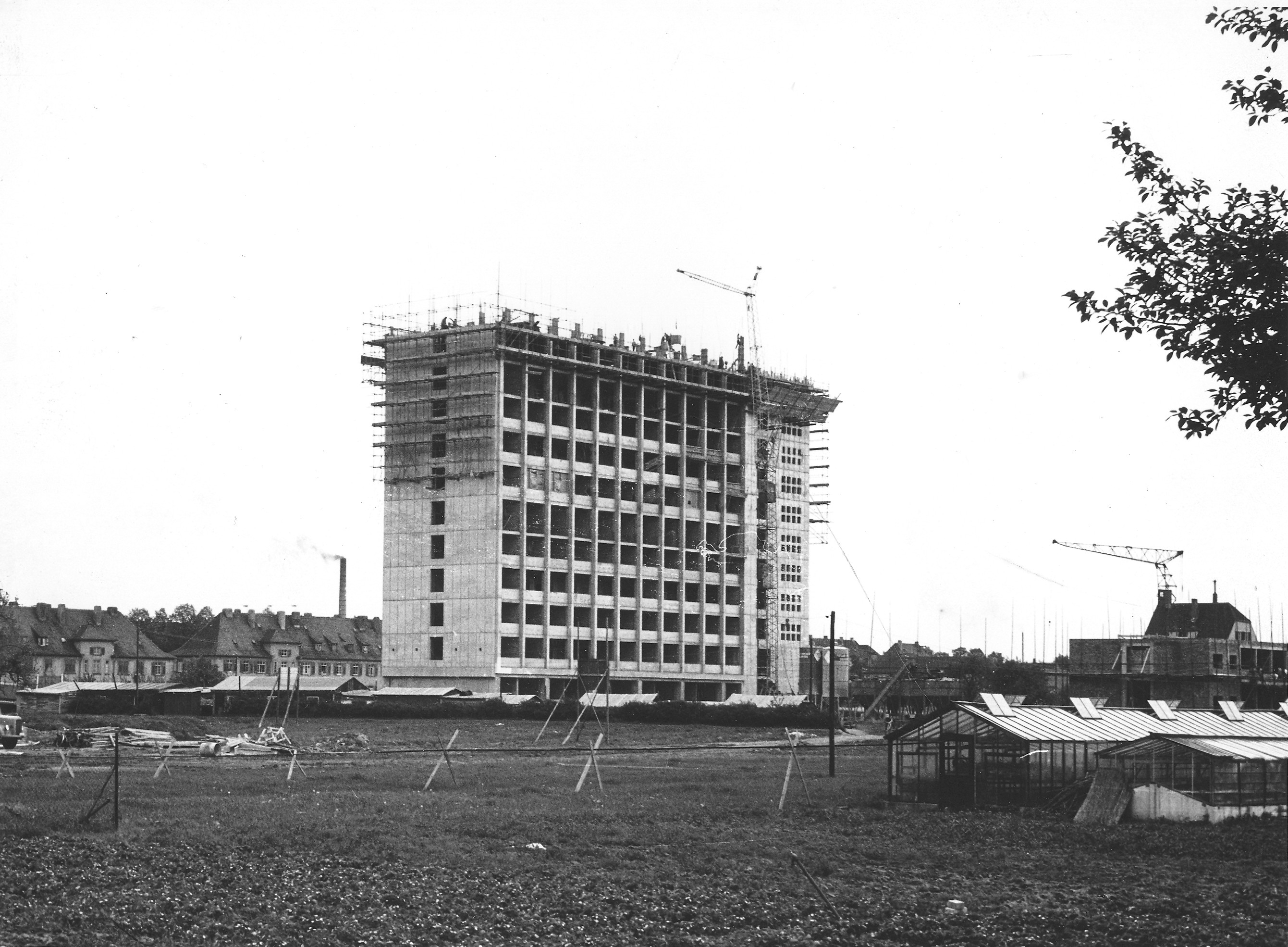 Fotografie der Arbeiten am DRV-Hochhaus um 1958.